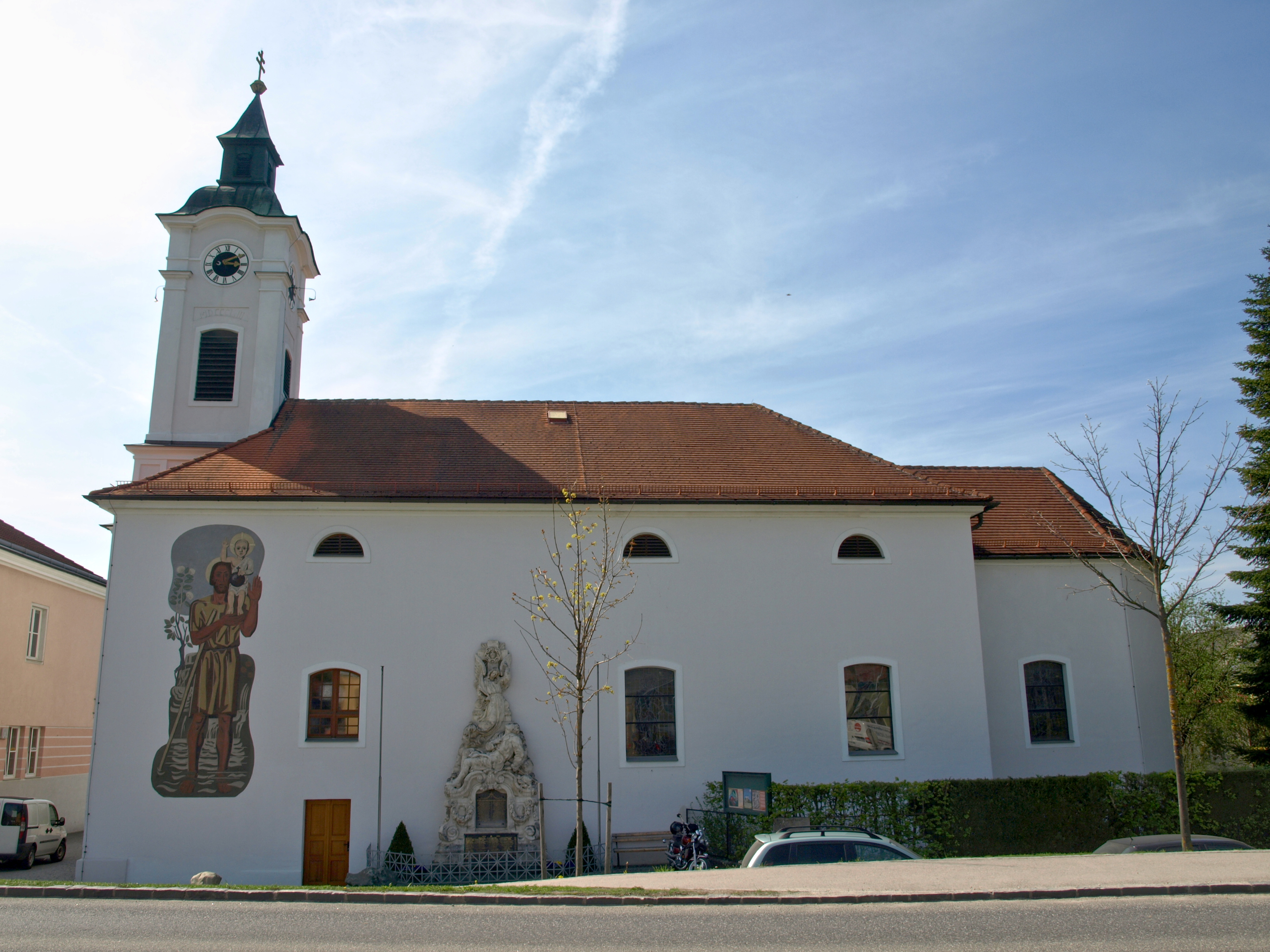 Kath. Pfarrkirche hl. Johann Nepomuk und Kriegerdenkmal